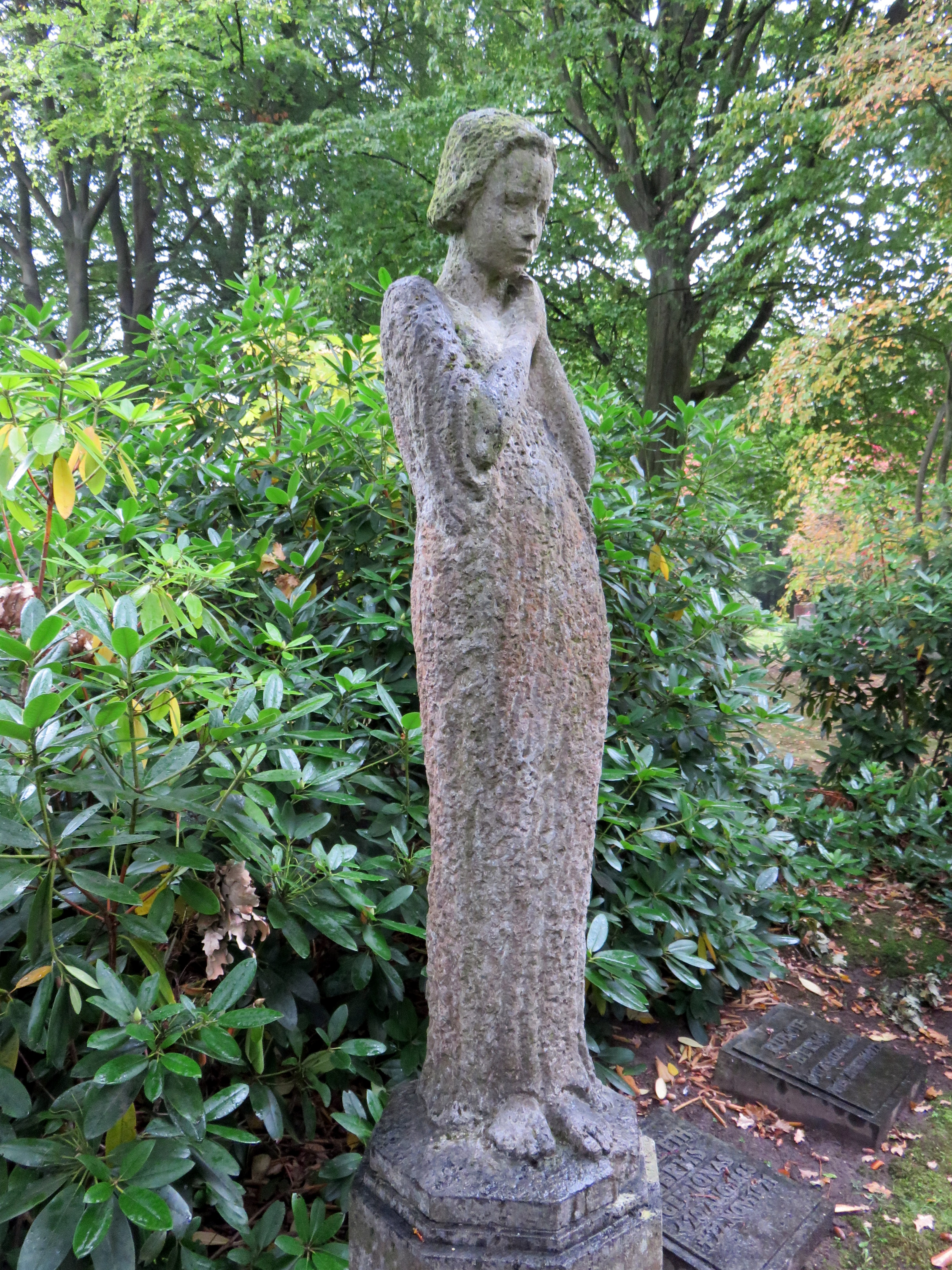 Familiengrab Levison, Friedhof Ohlsdorf, Planquadrat AE 36 (nordwestlich Kapelle 9). Die Skulptur wurde 1923 von der deutsch-australischen Bildhauerin Tina Haim-Wentscher geschaffen.